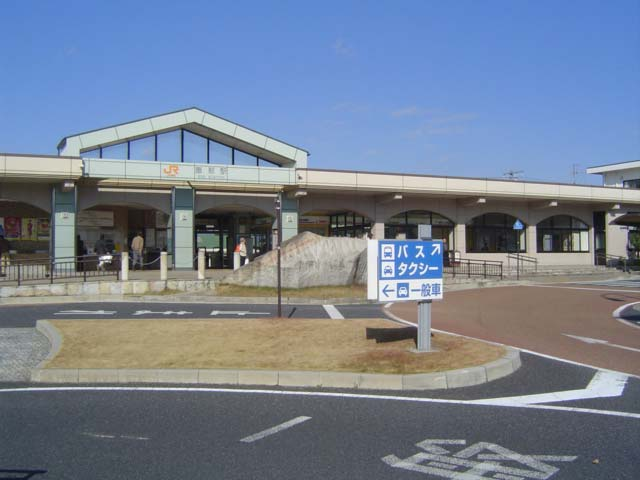 JR恵那駅駅舎